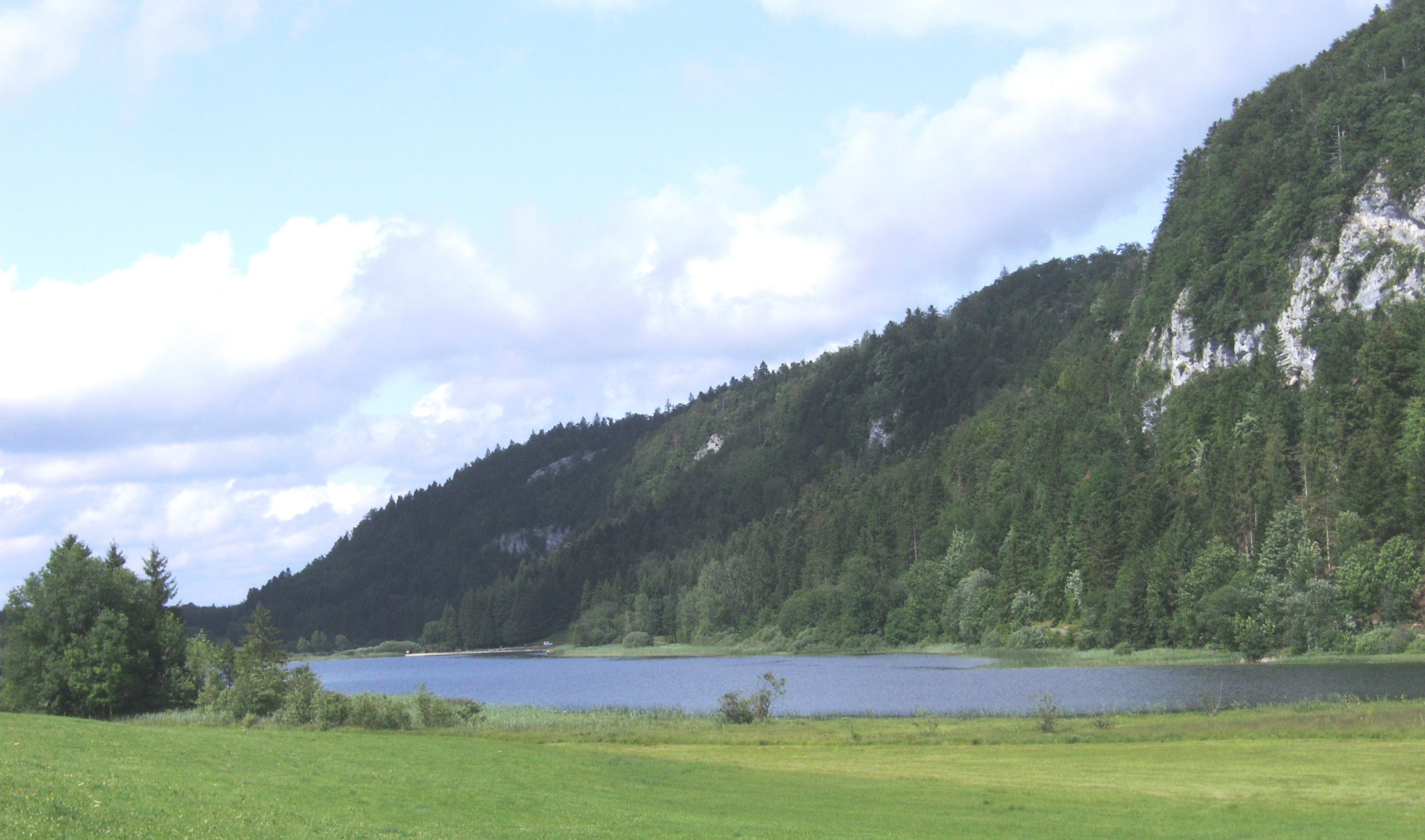 Lac d'Etival